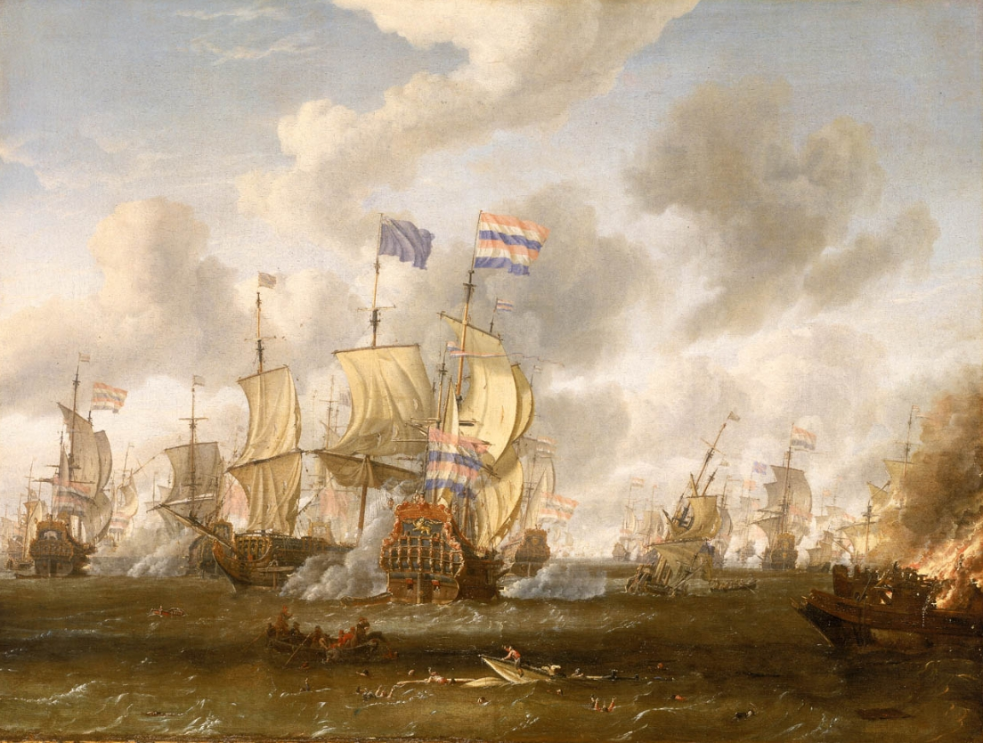 Gemälde von Abraham Storck (1644-1708): Die Gouden Leeuw im Angriff auf die Royal Prince in der Seeschlacht von Texel am 11. August 1673